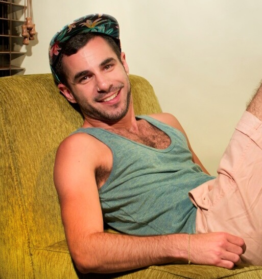 Photographer: Dekel Lazimi Lev